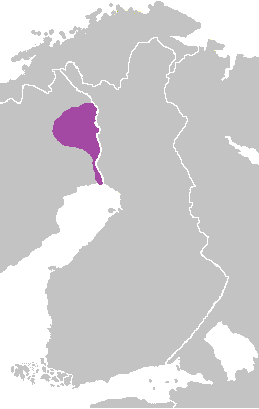 missä meänkieltä puhutaan